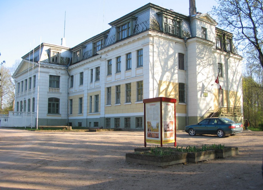 Lielauces pils